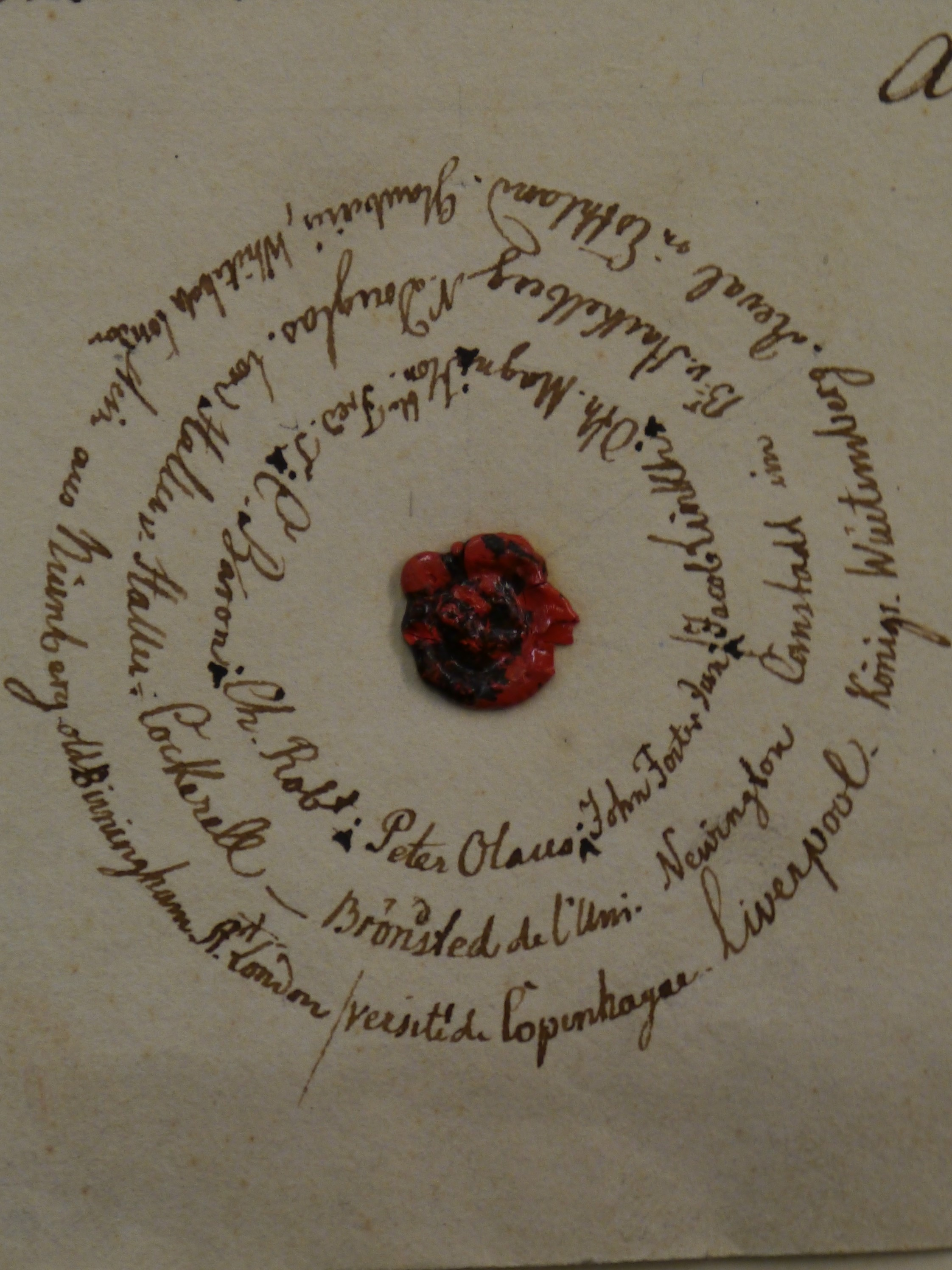 Signatures des membres fondateurs de Xénéoin, Bibliothèque nationale et universitaire de Strasbourg Ms.2.724, 2 [ §IVB] fol. 639.